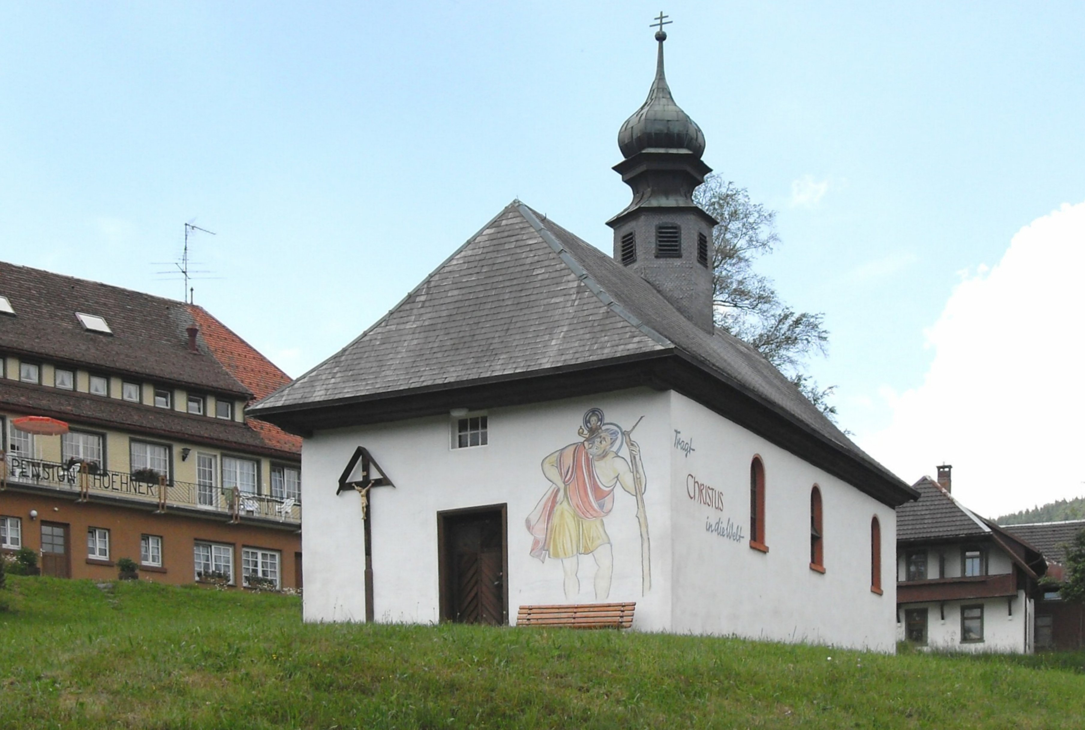 Herz-Jesu-Kapelle in Weg, Gemeinde Todtmoos, Schwarzwald, Deutschland